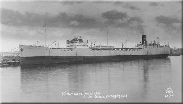 Der norwegische Tanker SIR KARL KNUDSEN später der deutsche Versorgungstanker Charlotte Schliemann